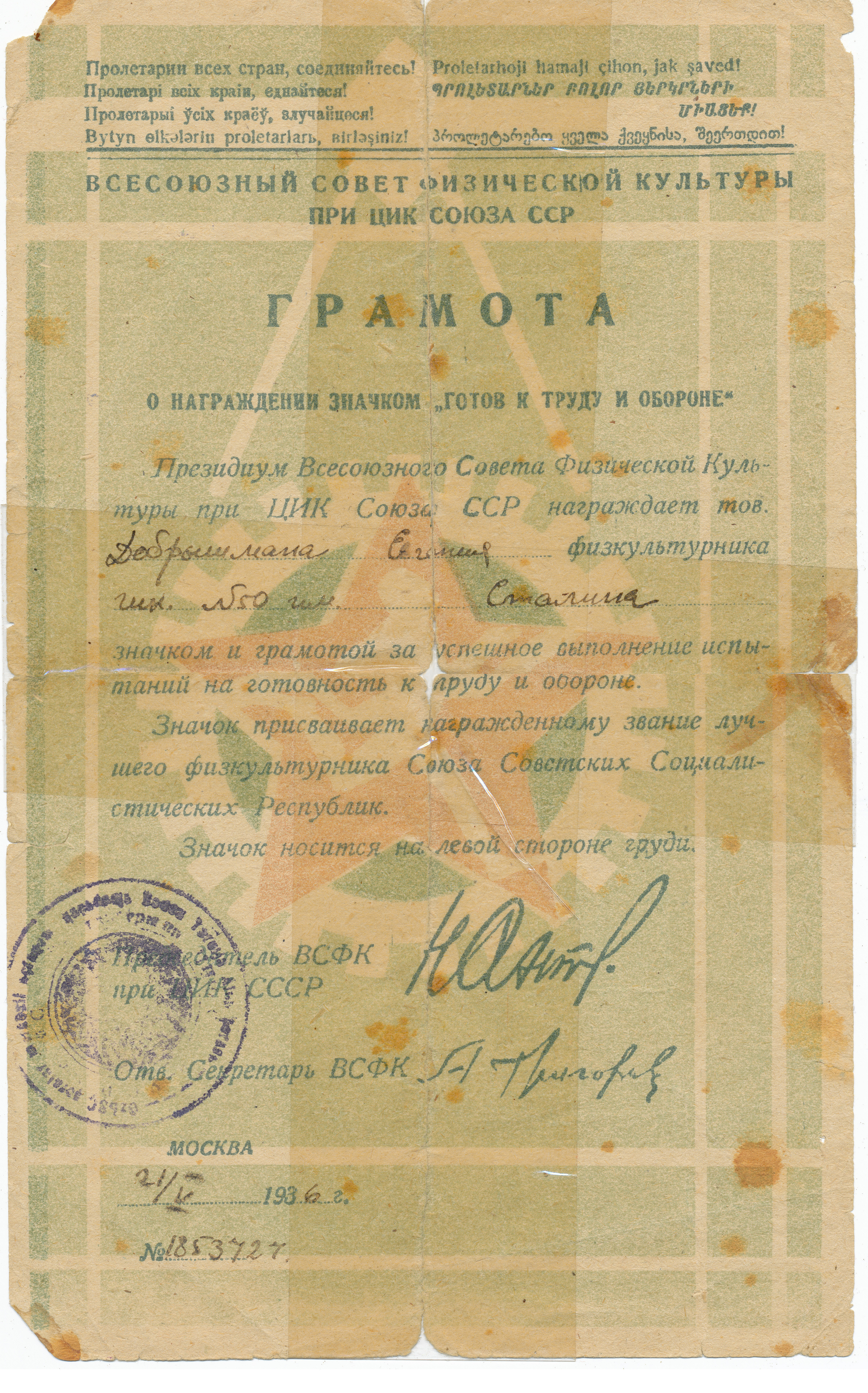 Документы, выданные Е. М. Добрышману (1919-2016) в том, что он сдал нормы ГТО СССР в 1936 году (Ташкент).